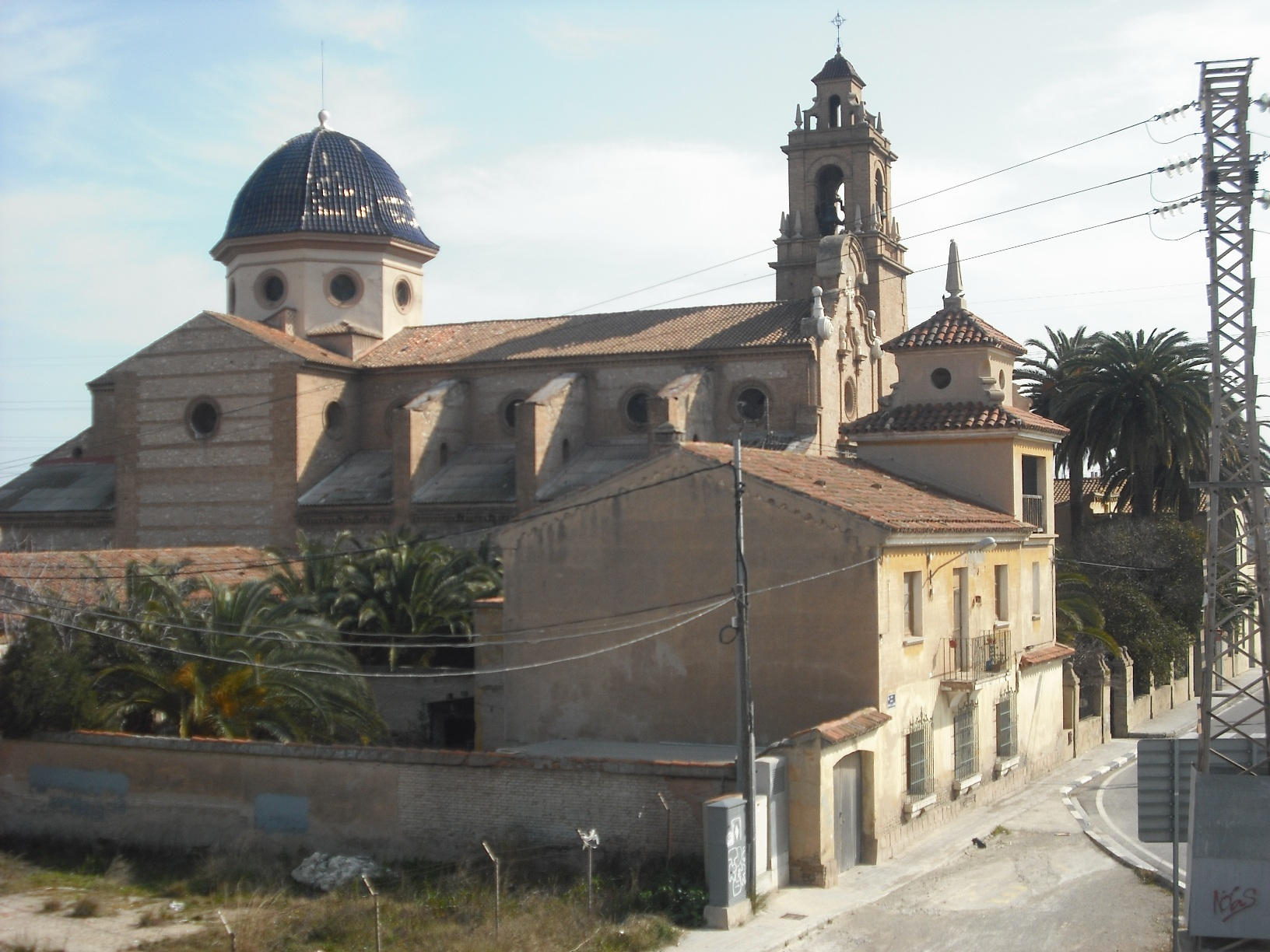 Església de la Concepció de La Punta (districte de Quatre Carreres), a prop de Natzaret.